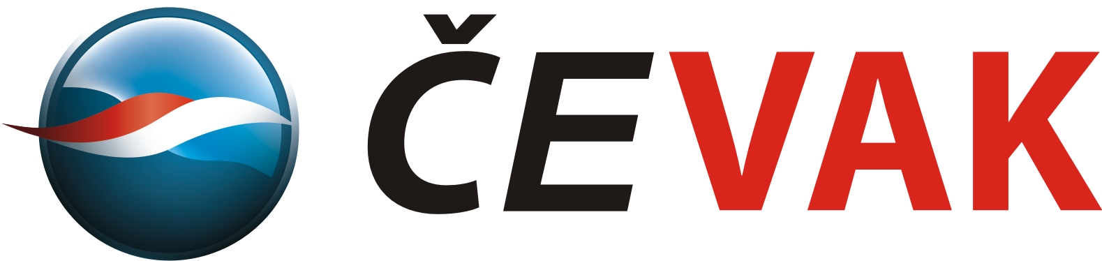 Logo ČEVAK a.s.